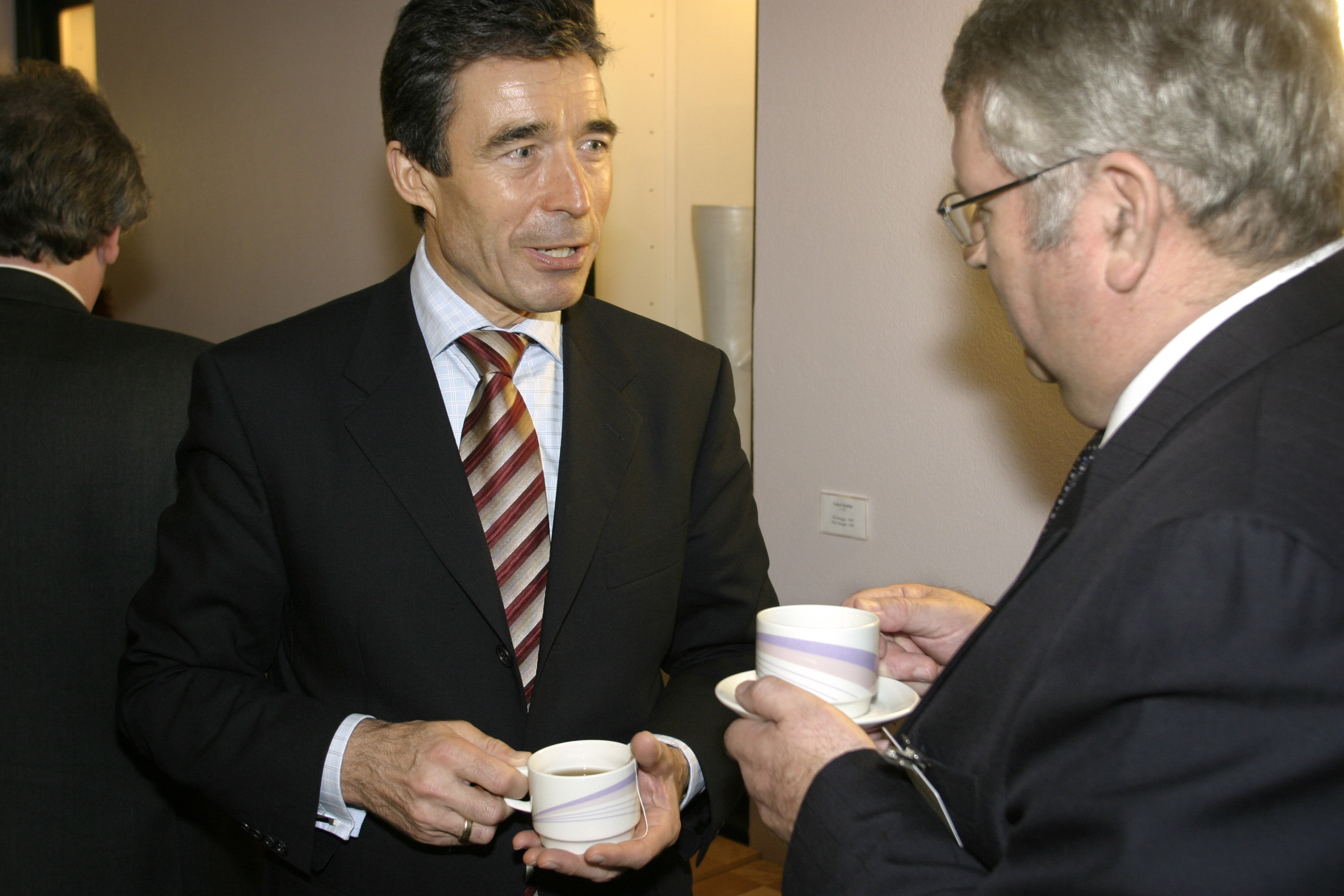 Anders Fogh Rasmussen, Danmarks statminister och Anfinn Kallsberg, Landsstyreformand, Färöarna (Bilden är tagen vid Nordiska rådets session i Oslo, 2003)